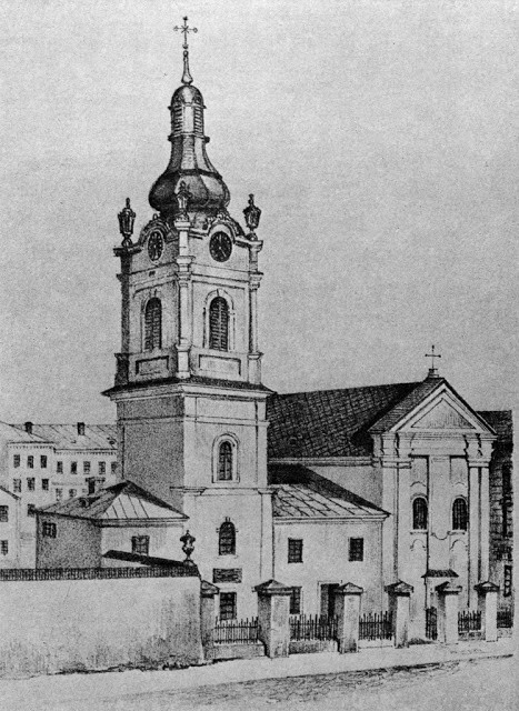 Малюнок церкви з дзвіницею